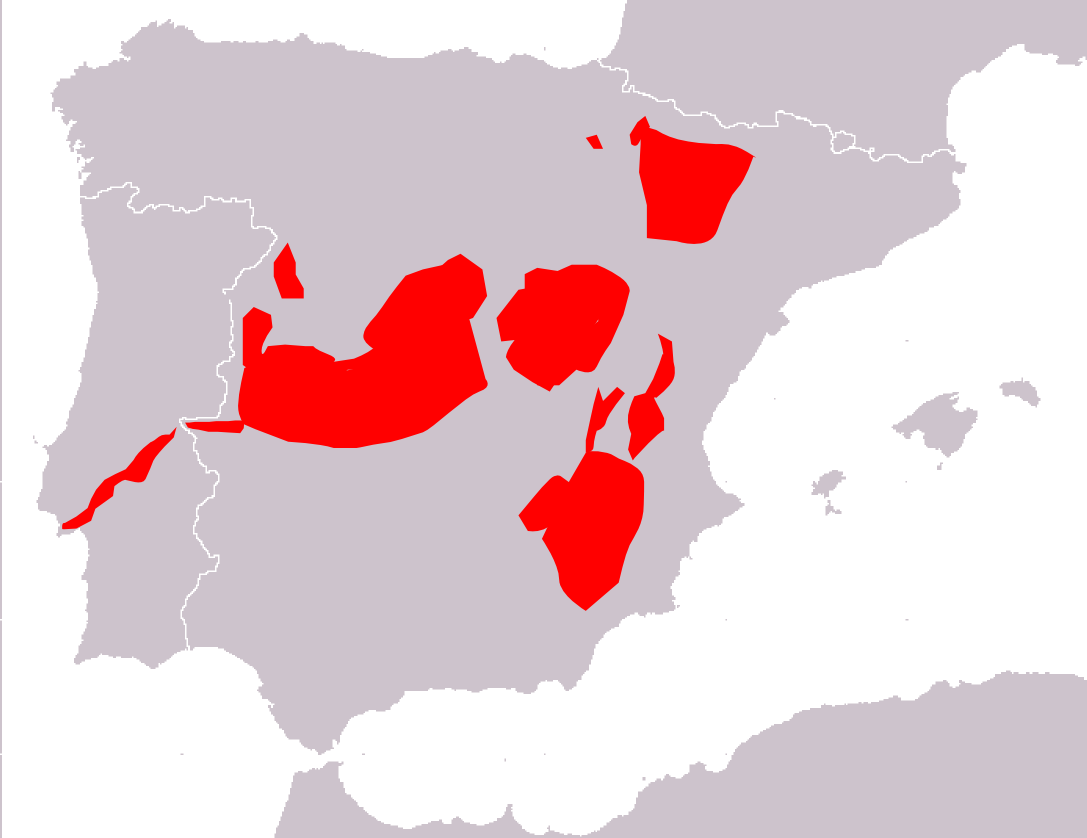 Mapa de distribución de Microtus cabrerae